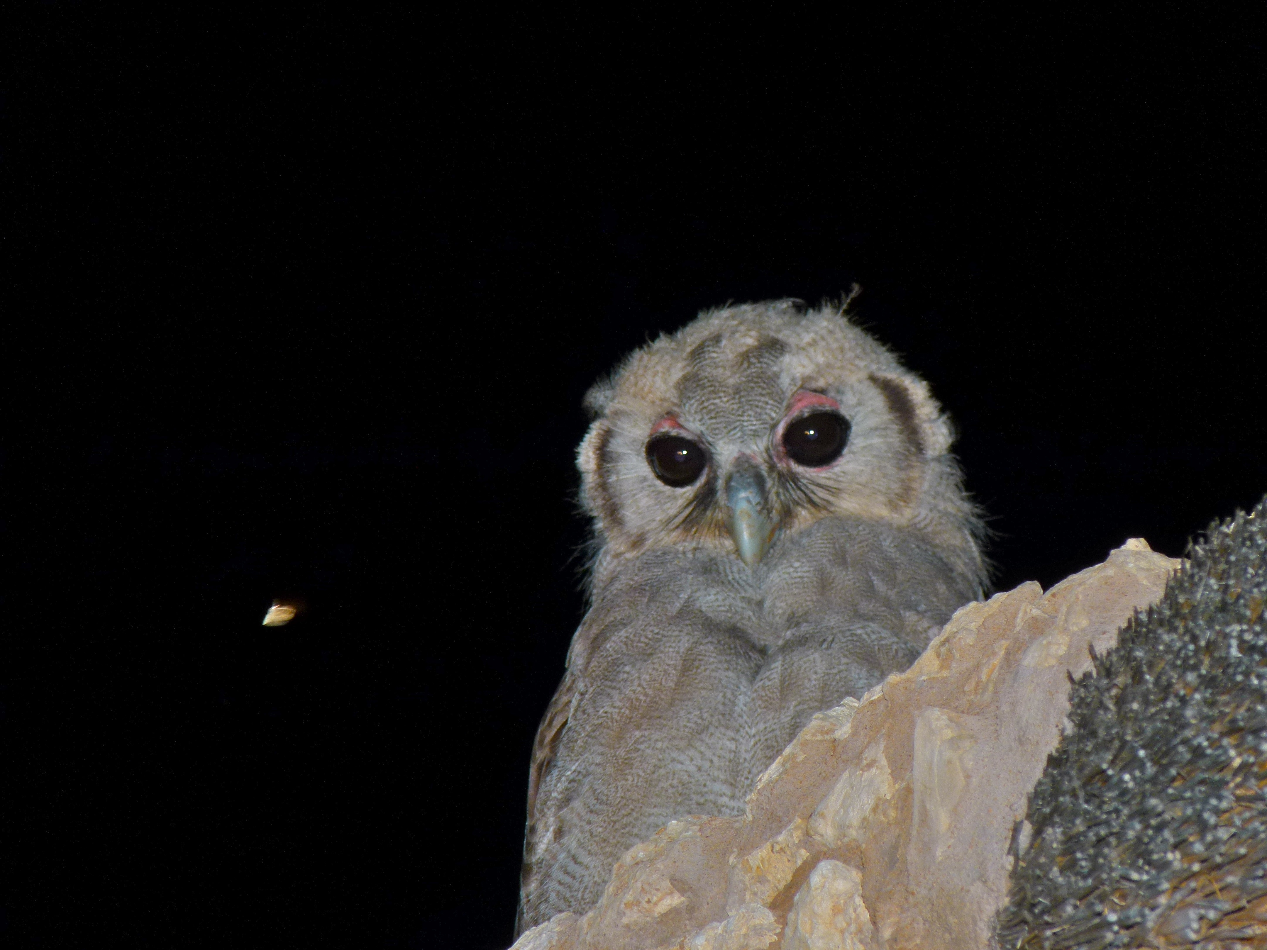 Twee Rivieren Camp, Kgalagadi Transfrontier Park, SOUTH AFRICA